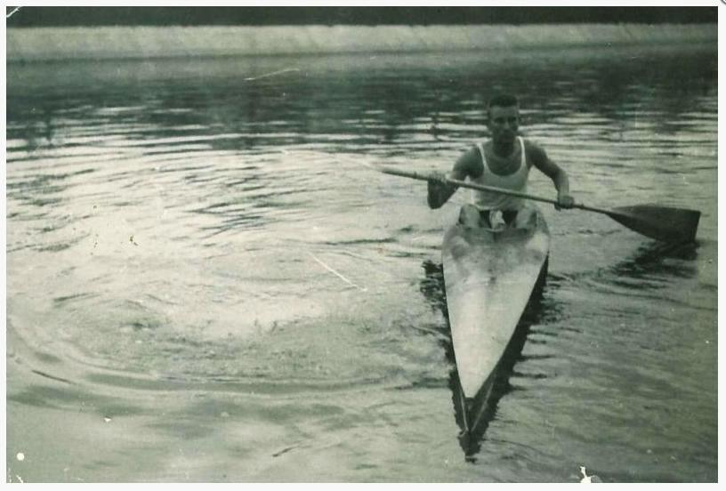 Chełmżyńskie Towarzystwo Wioślarzy - kajakarz Czesław Błaszkiewicz